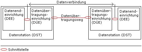 Datenübertragung zwischen zwei Datenstationen. (Original text: Das Bild soll den beschriebenen Sachverhalt verdeutlichen)